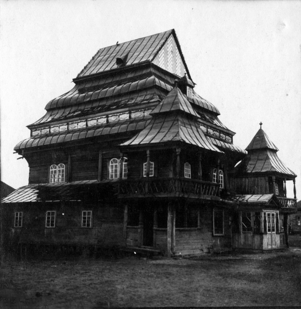 Беларуская (тарашкевіца): Нароўля (Naroŭla). Сынагога